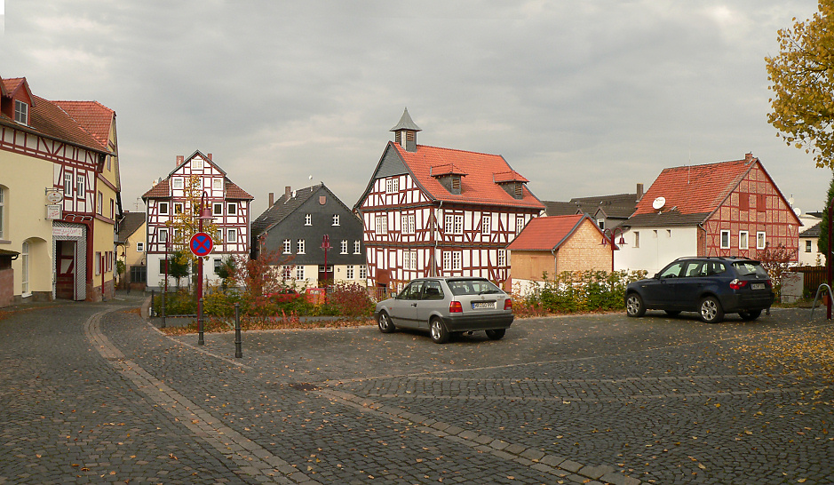 Historische Altstadt Borken